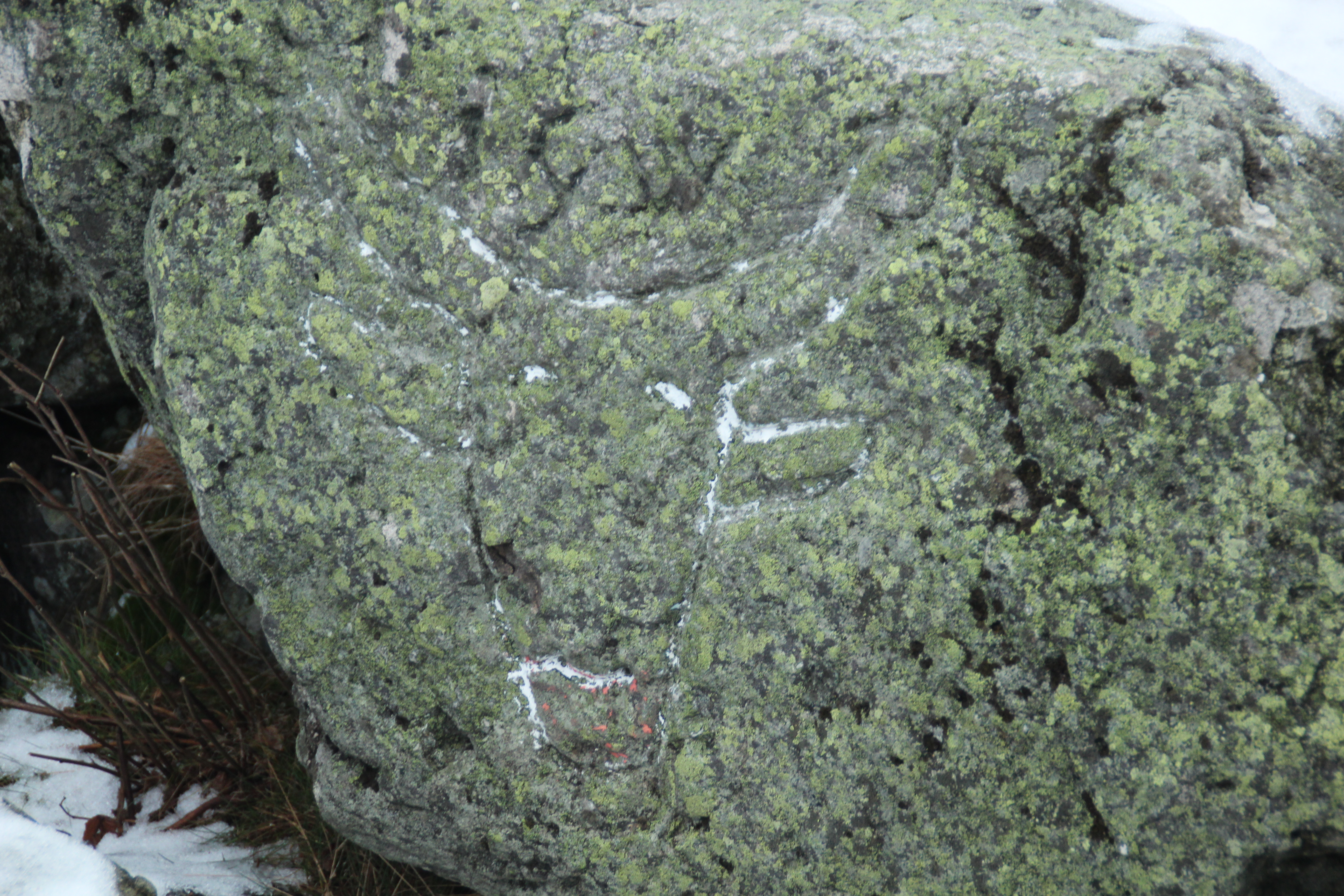 Ochsenkopf-Felszeichnung am Ochsenkopf (Fichtelgebirge)